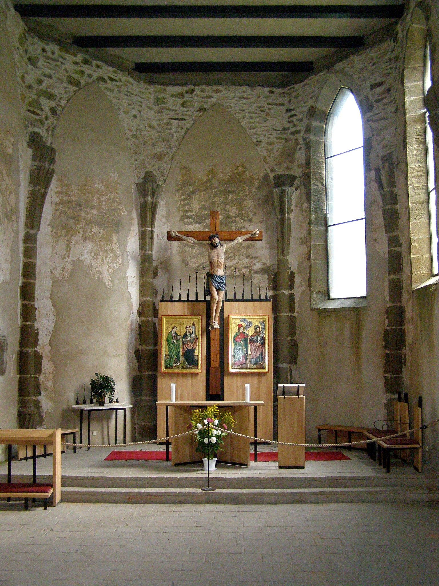 Interiér hradnej kaplnky sv. Alžbety This medium shows the protected monument with the number 810-830/5 in the Slovak Republic.